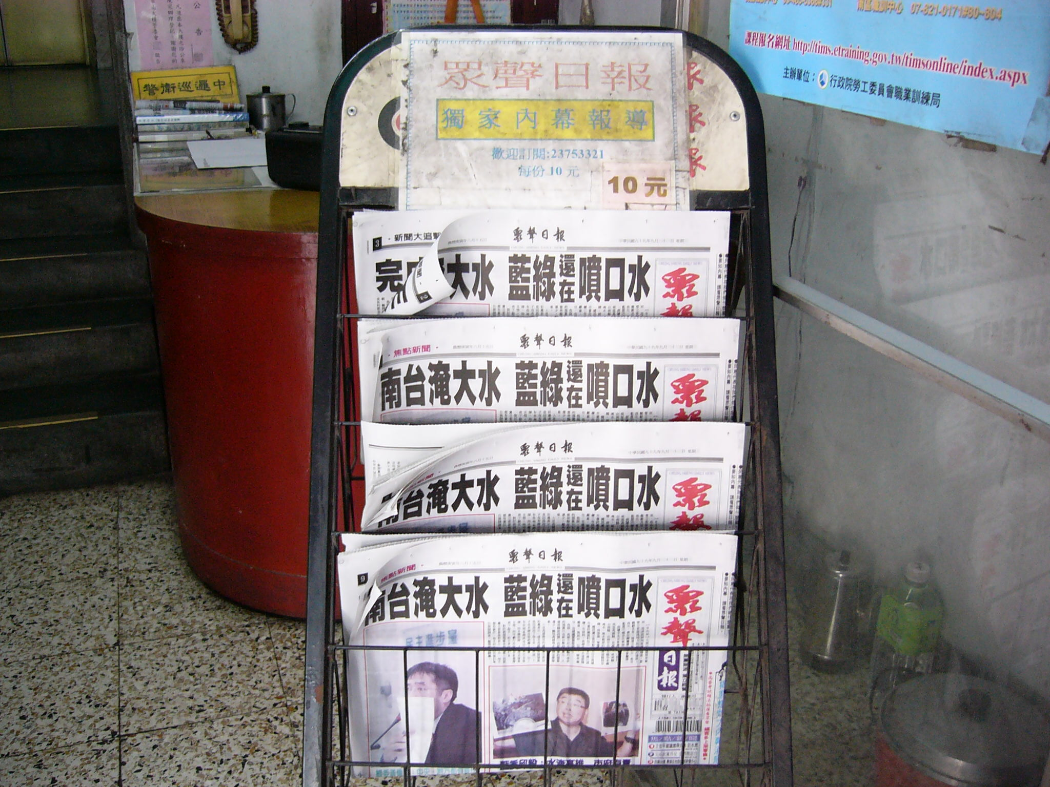 台灣台北市中正區漢口街一段「華南產險大樓」1樓大門警衛桌前的《眾聲日報》報架。